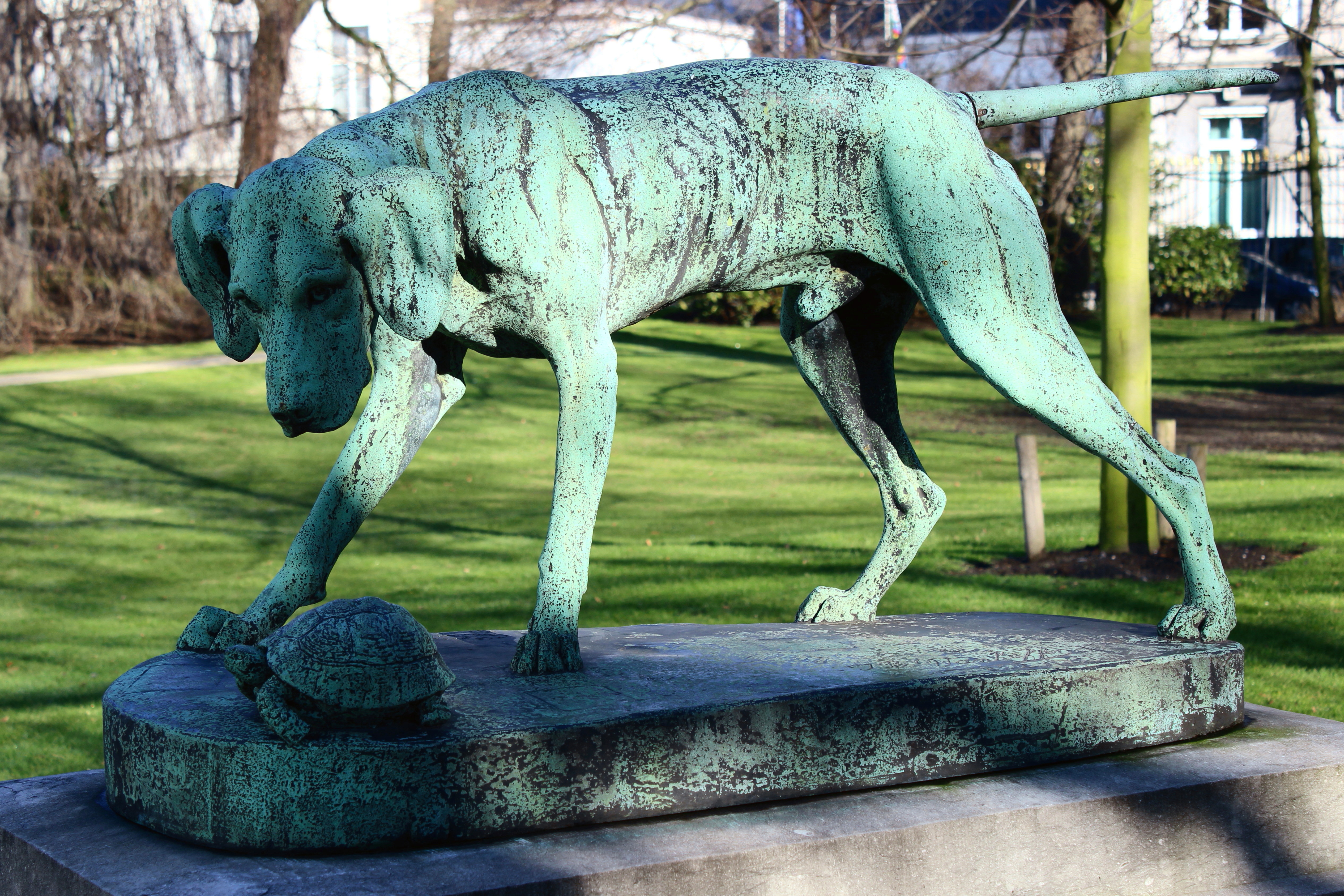 Palais des Académies, rue Ducale, Bruxelles (Belgique). La Surprise, de Jean-Baptiste Van Heffen